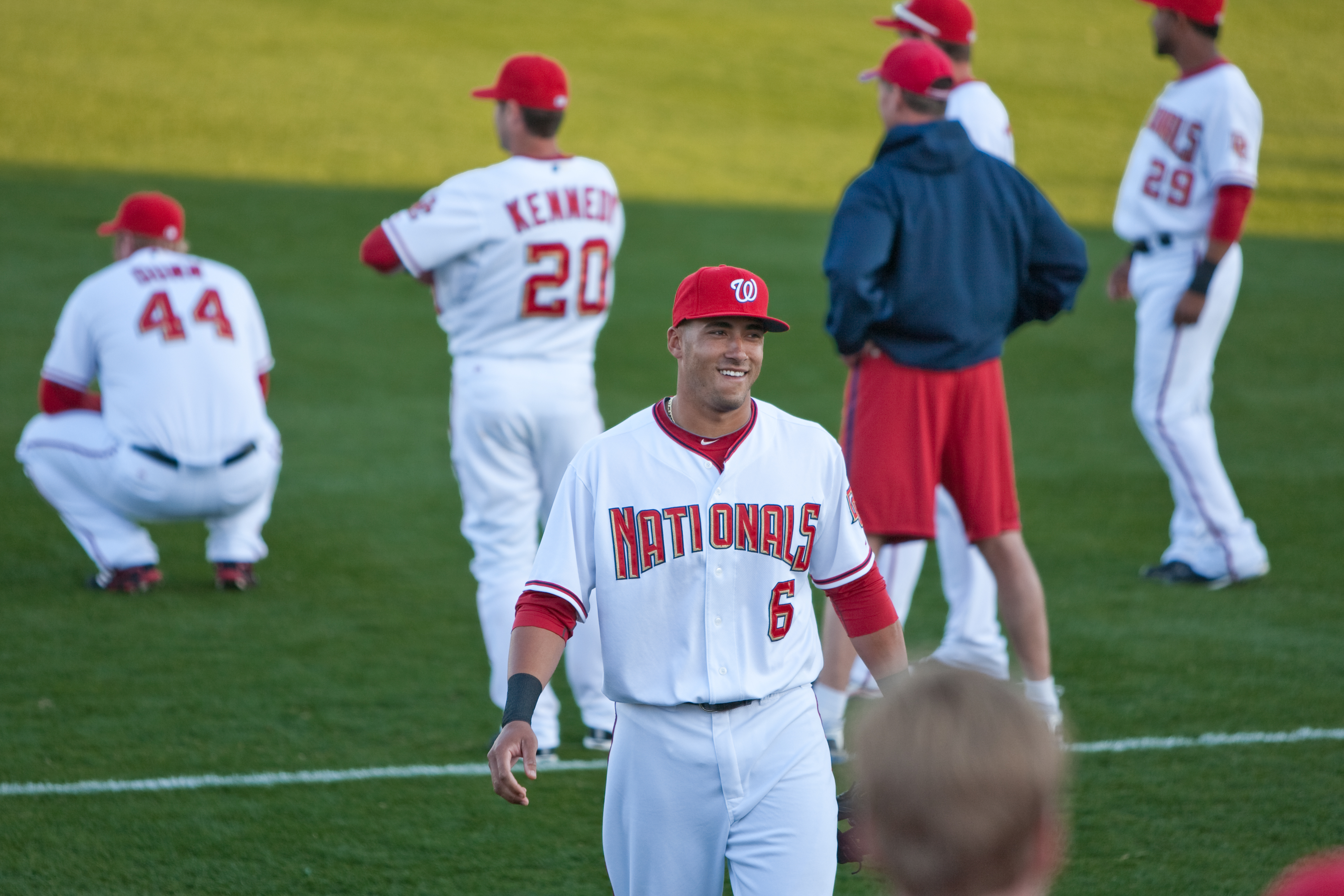 Ian Desmond